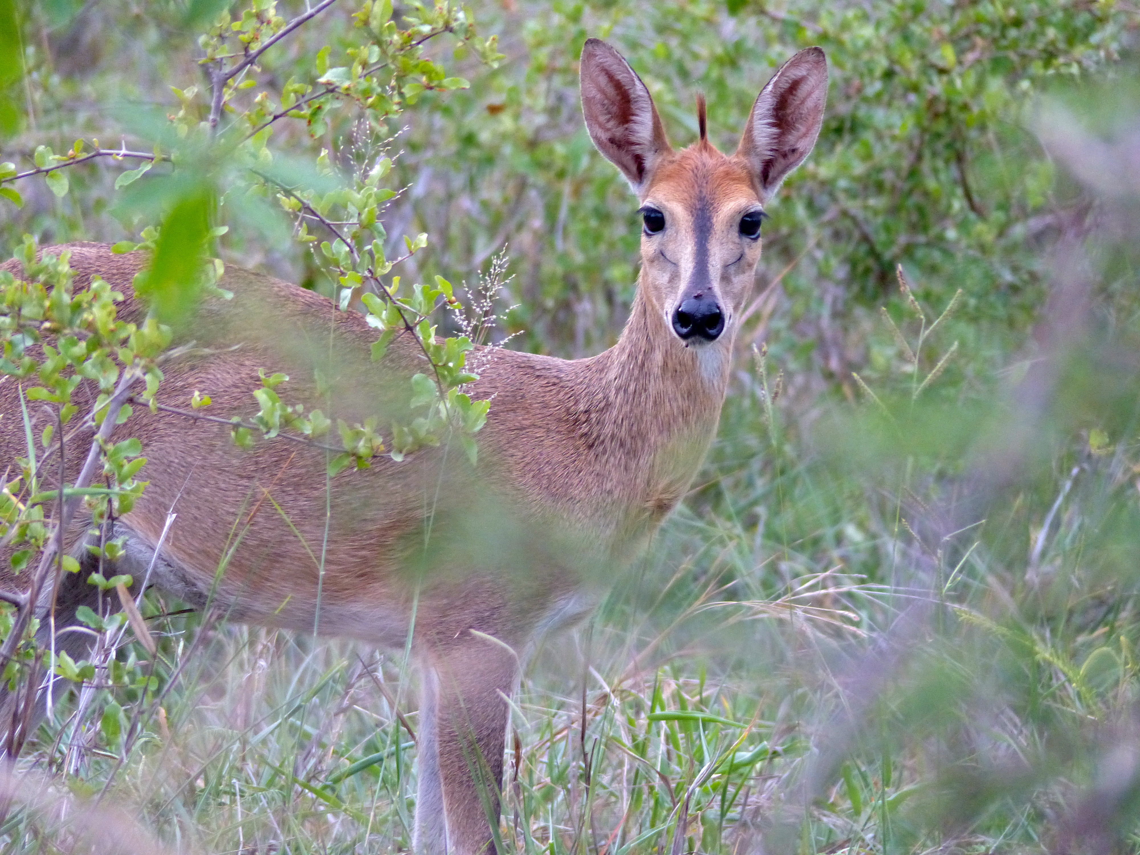 Mahonie Loop near Punda Maria, Kruger NP, SOUTH AFRICA